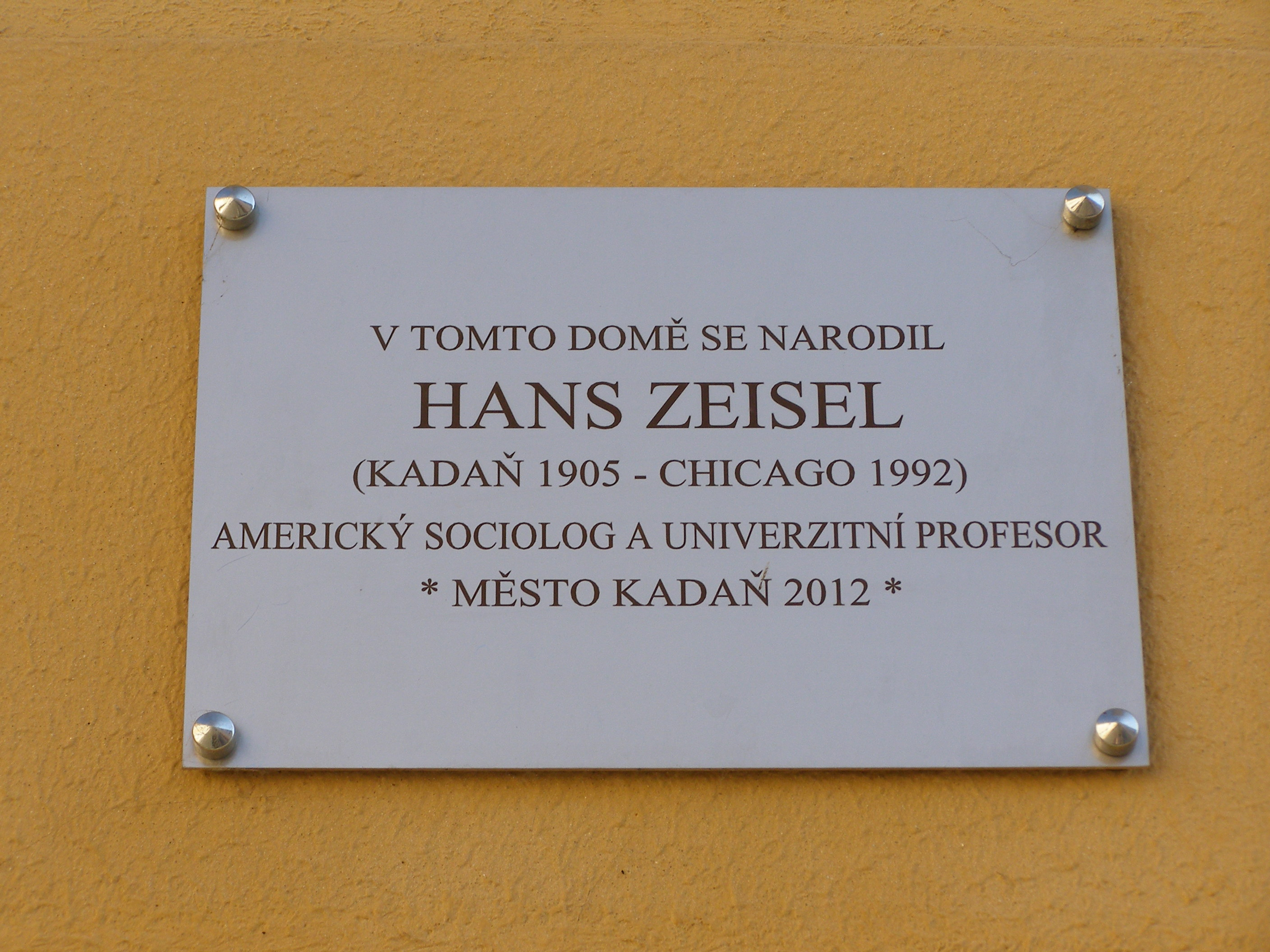 Pamětní deska - Hans Zeisel; Kadaň, Boženy Němcové čp. 69.